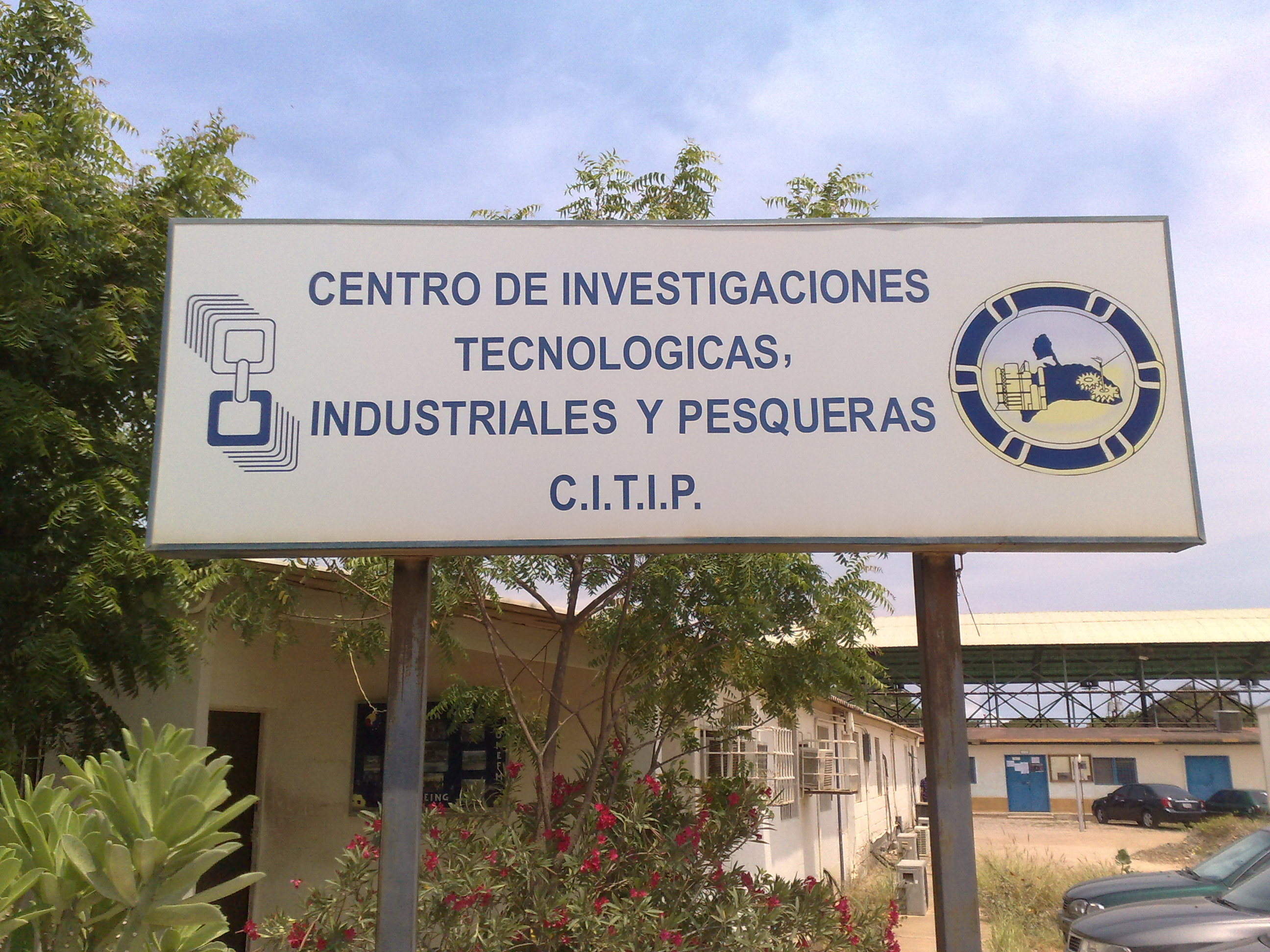 Centro de Investigaciones Tecnológicas, Industriales y Pesqueras (CITIP). Universidad Nacional Experimental Francisco de Miranda.